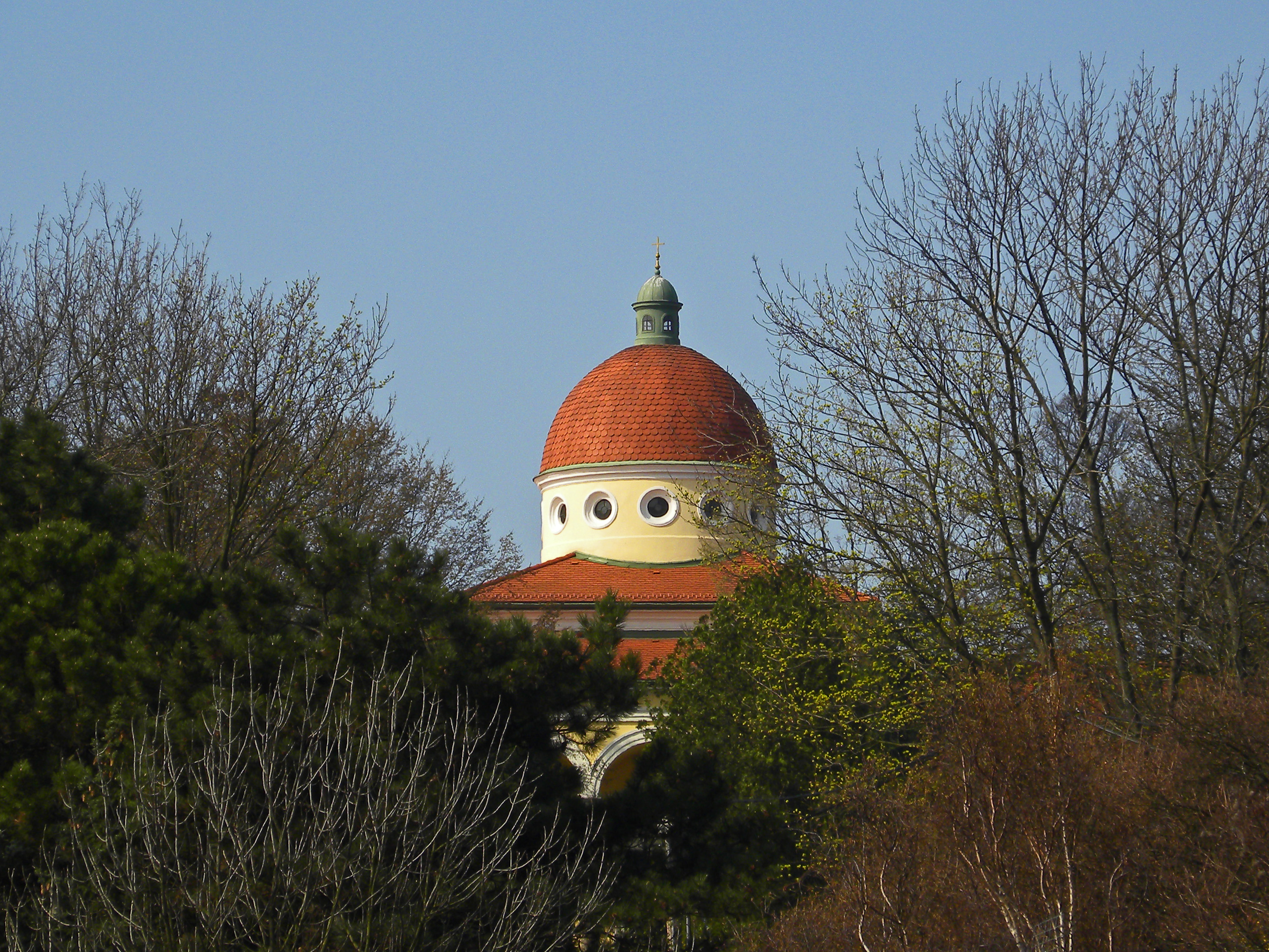 Faniteum, Karmelitinnenkloster